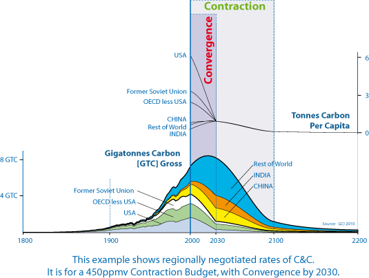 C&C Example